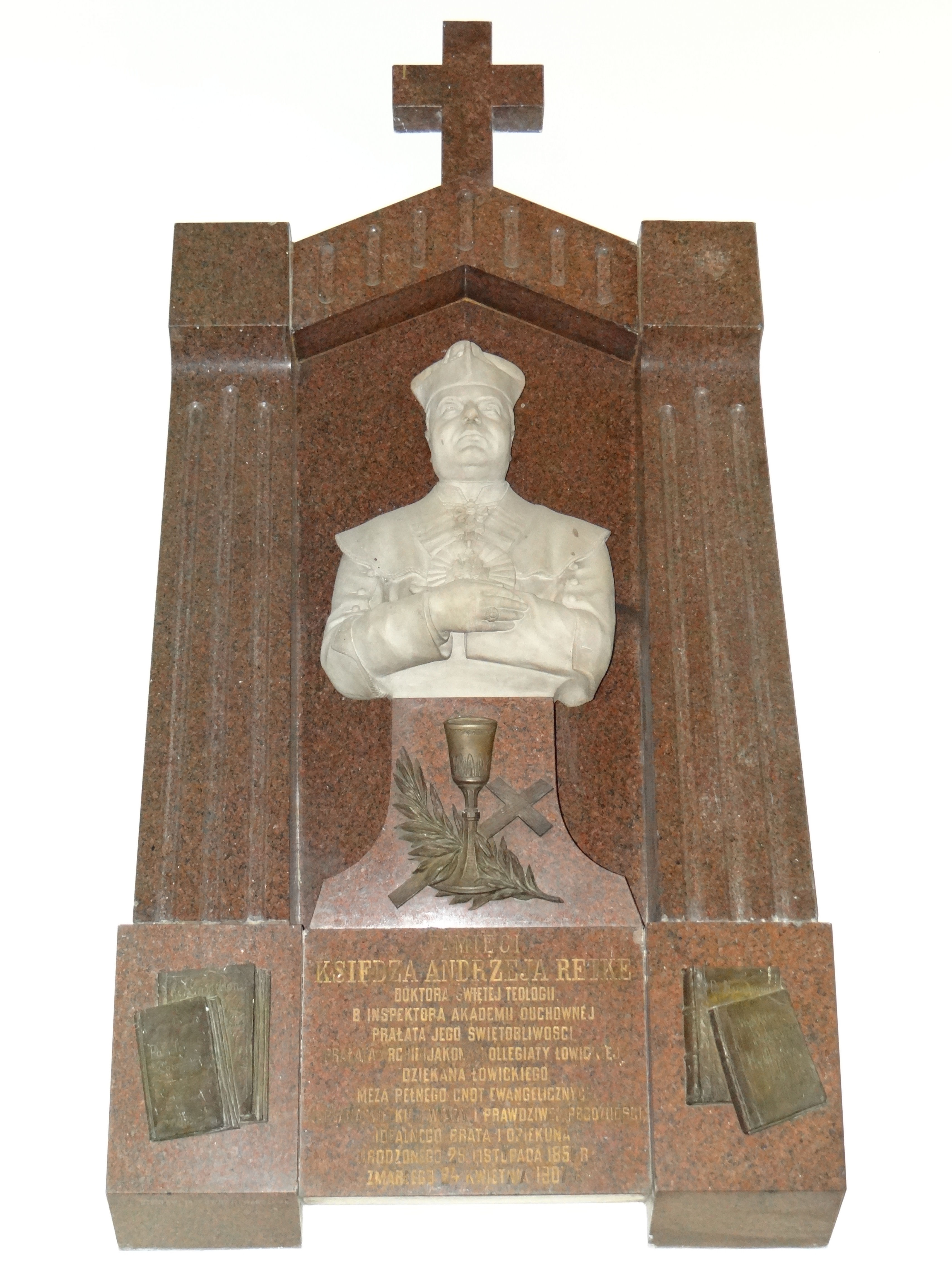 Bazylika Katedralna w Łowiczu - nagrobek prałata Andrzeja Retke